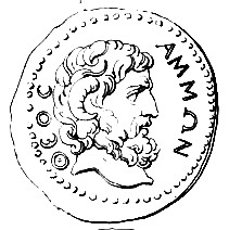 Jupiter Ammon, médaillon de bronze de Mytilène.